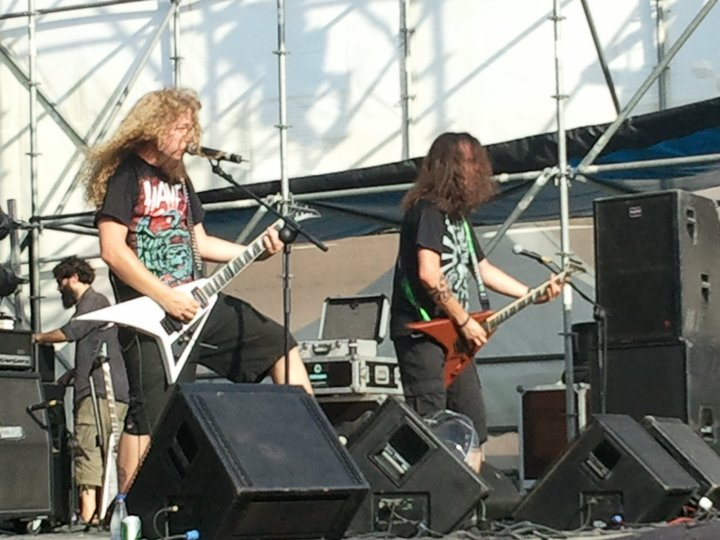 Angelus Apatrida actuant al festival Leyendas del Rock celebrat el 13 d'agost de 2011 a la localitat murciana de Beniel.